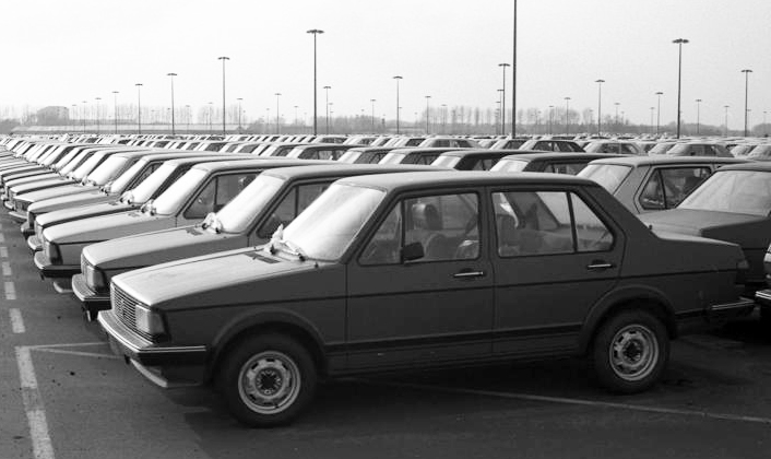 VW-Werk Wolfsburg- Fahrzeuge der Typen Golf und Jetta auf Halde. 16.-17.03.1981